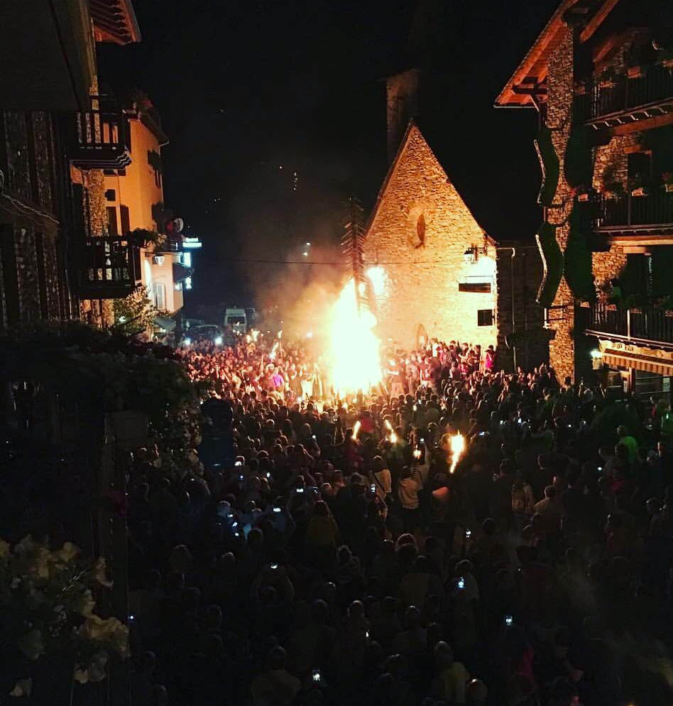 Fallas en Alins (Vall Ferrera). Año 2016. Foto de Mercè Turallols Vidal.